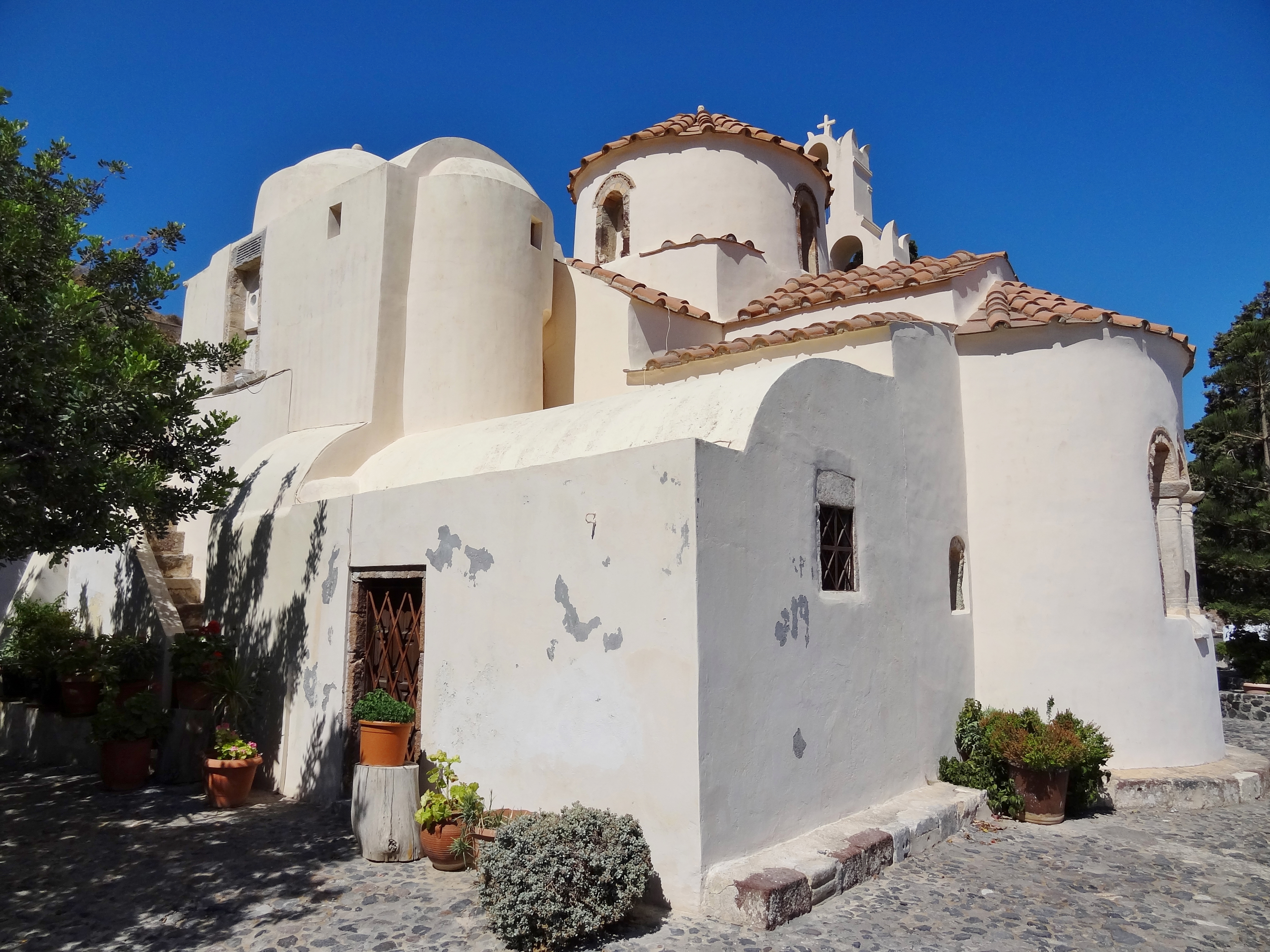 Kirche Panagia Episkopi (Παναγία Επισκοπή) in Mesa Gonia, Santorin (Thera), Kykladen, Griechenland